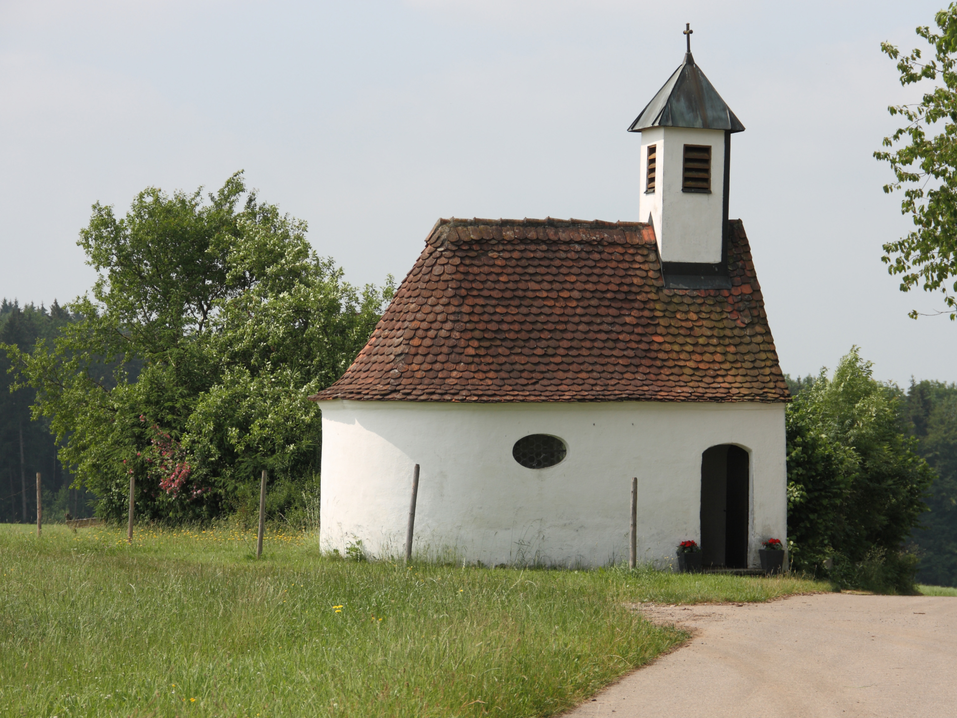 Nordansicht